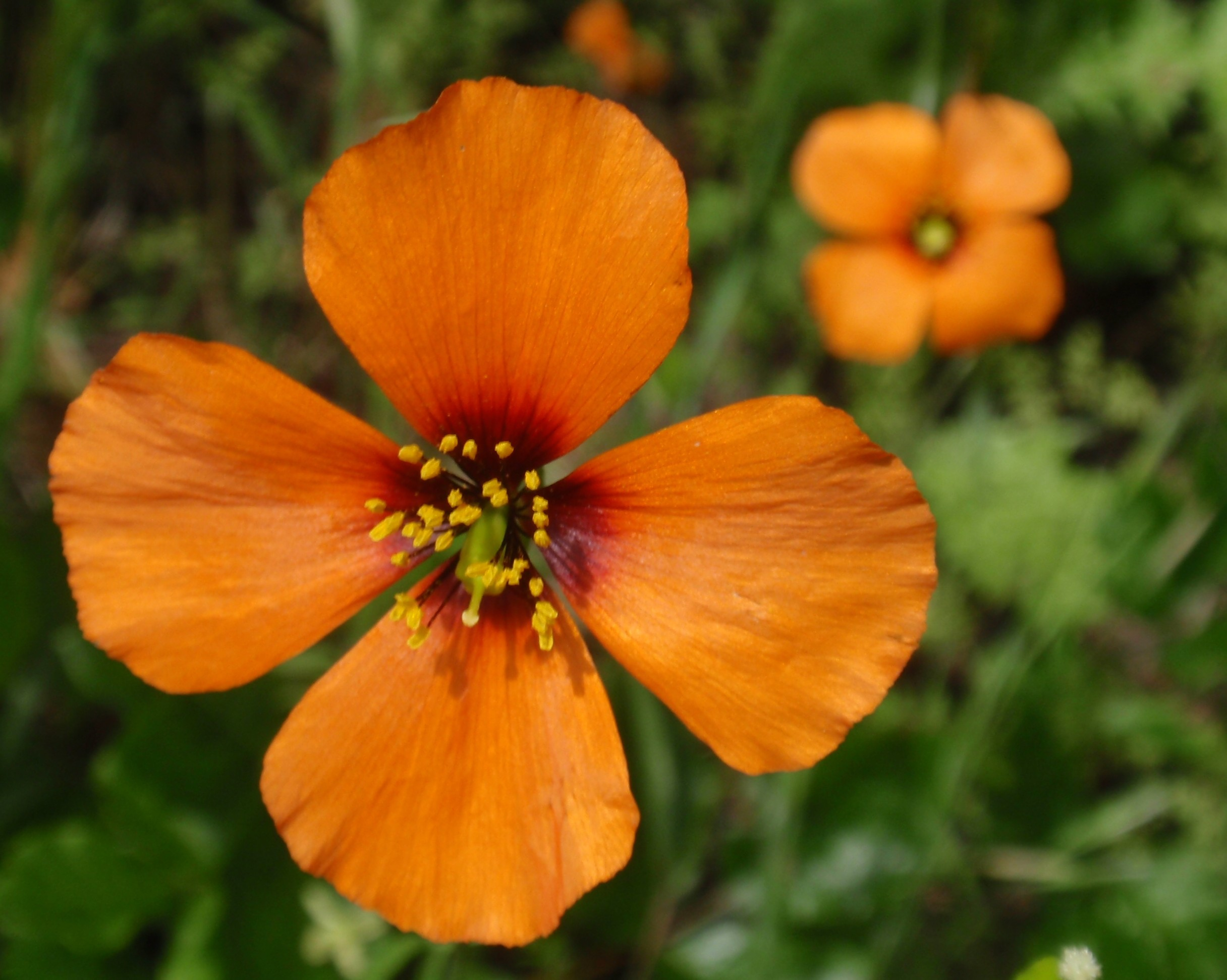 Wind Poppy